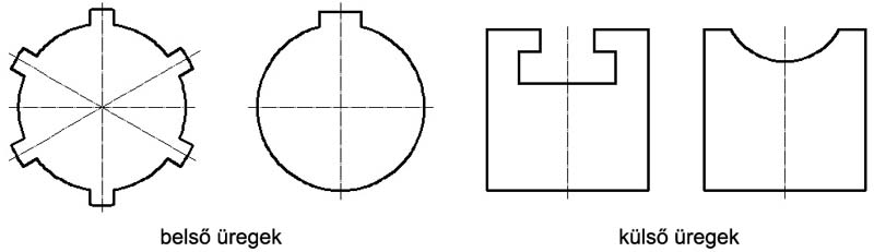 Jellegzetes üregelt alakok